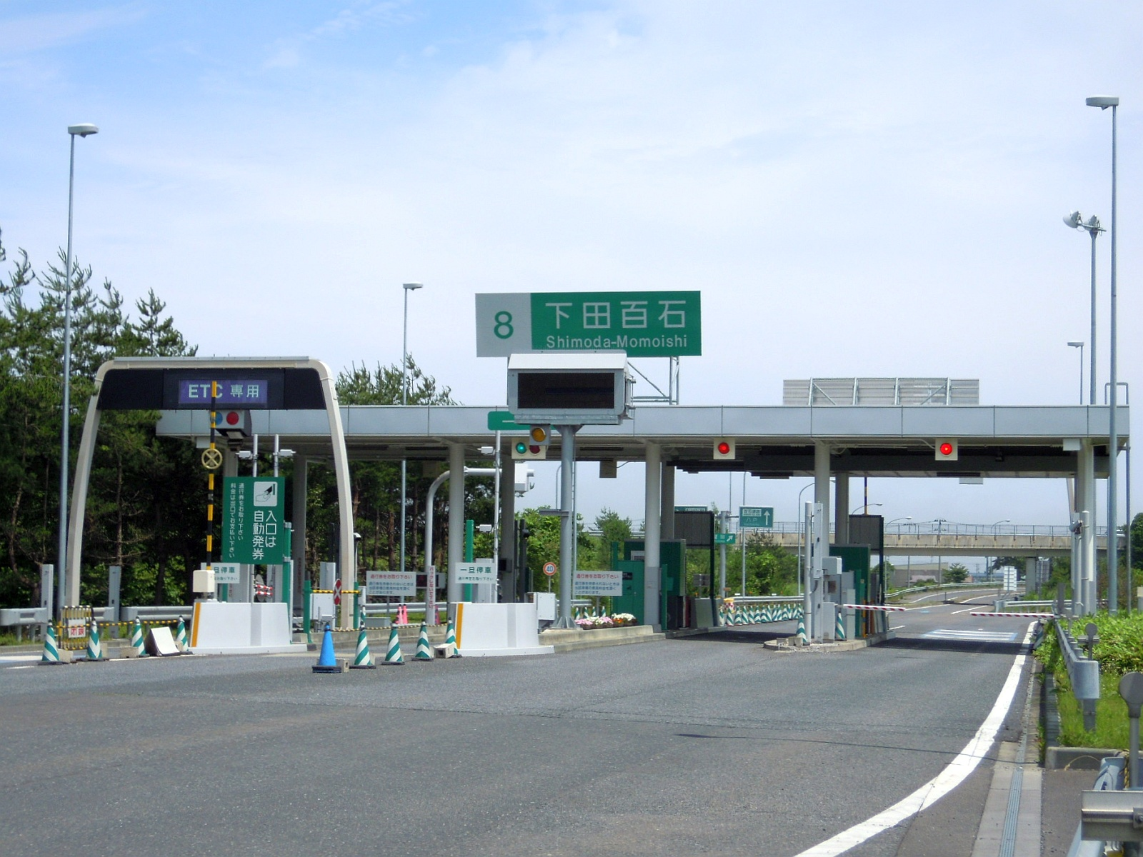 青森県上北郡おいらせ町にある百石道路・第二みちのく有料道路の下田百石インターチェンジ料金所を一般道側から